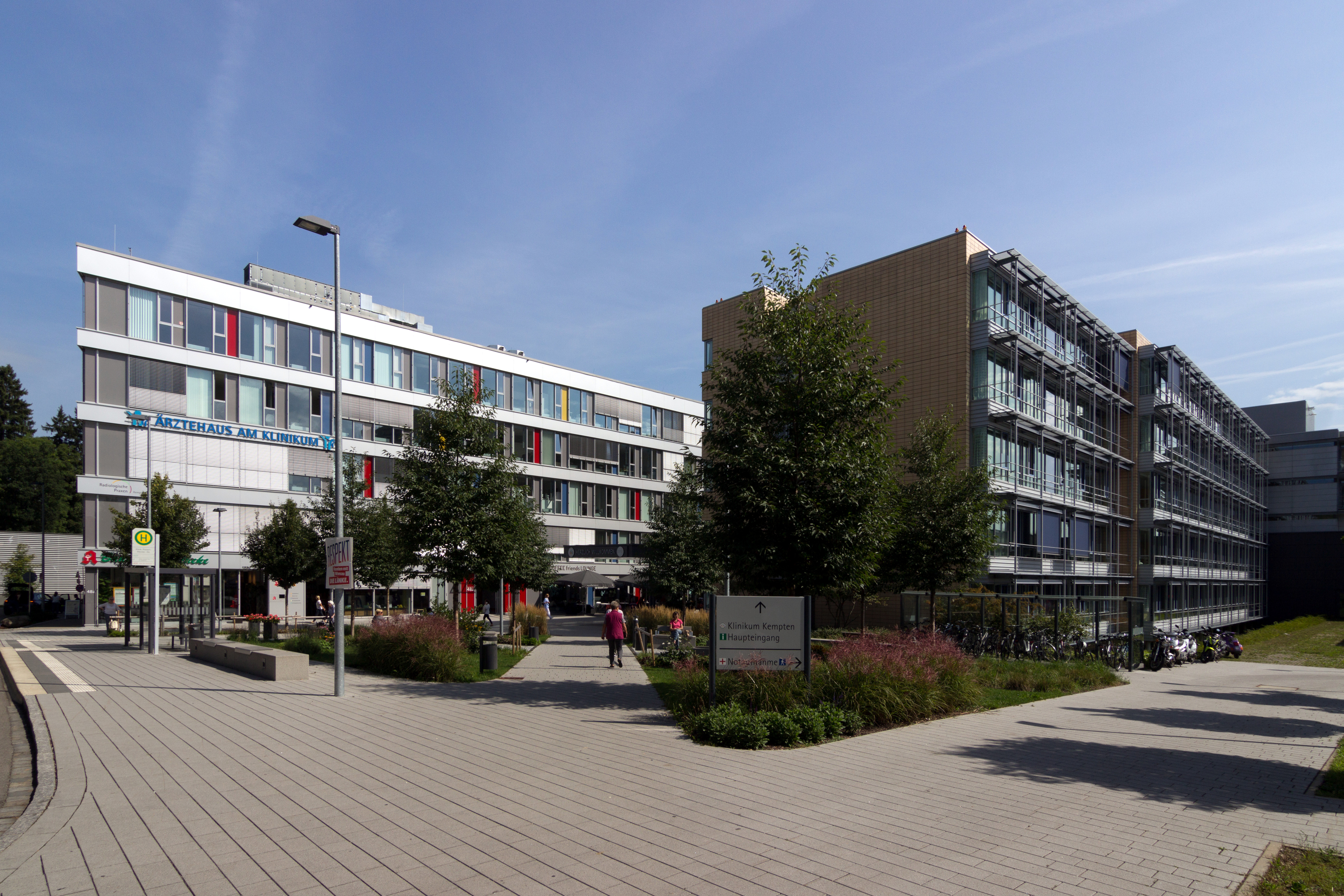 Klinikum Kempten und Ärztehaus am Klinikum, Haupteingangsbereich des Klinikums